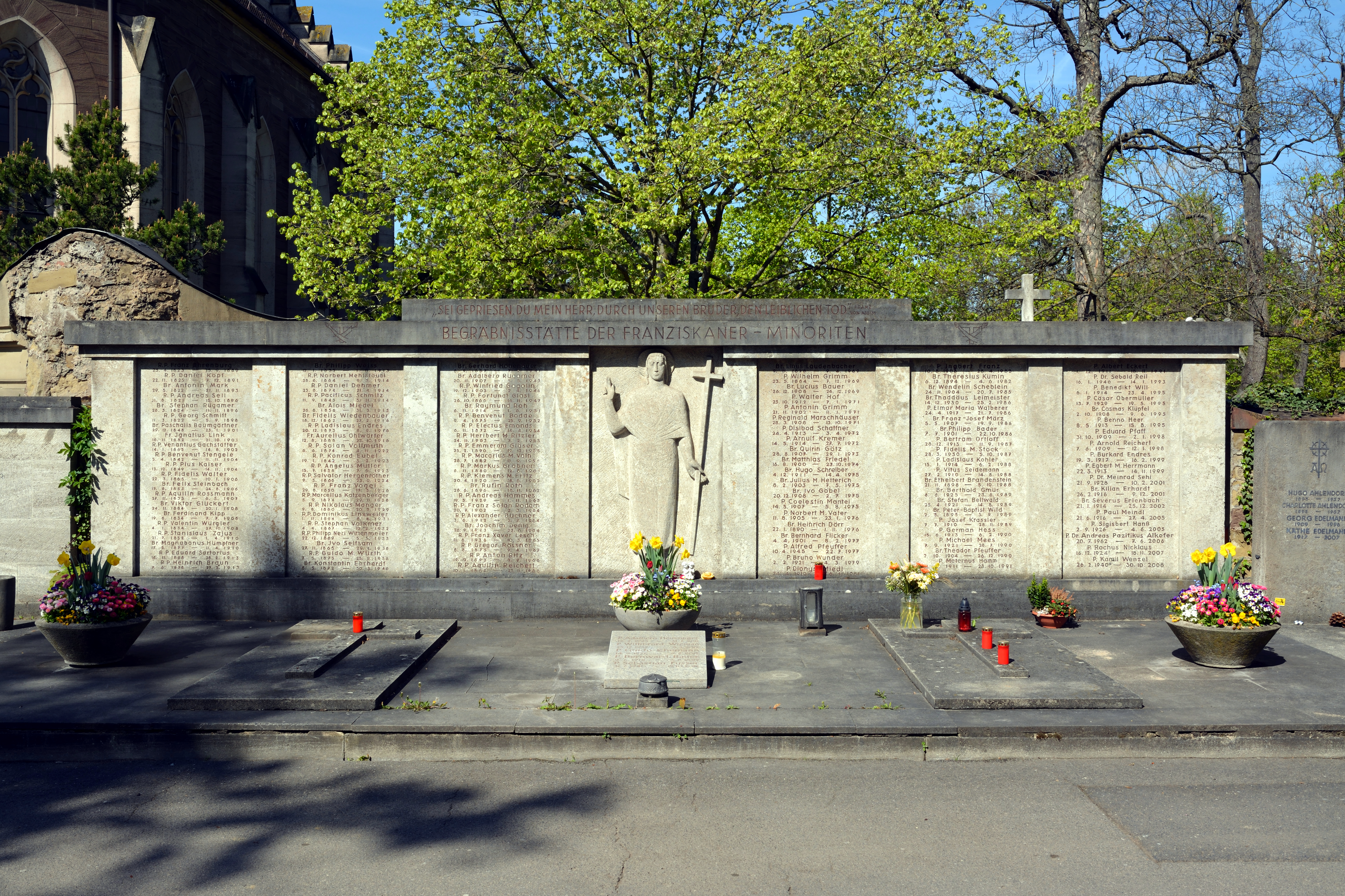 Impressionen vom Hauptfriedhof Würzburg Begräbnisstätte der Franziskaner-Minoriten